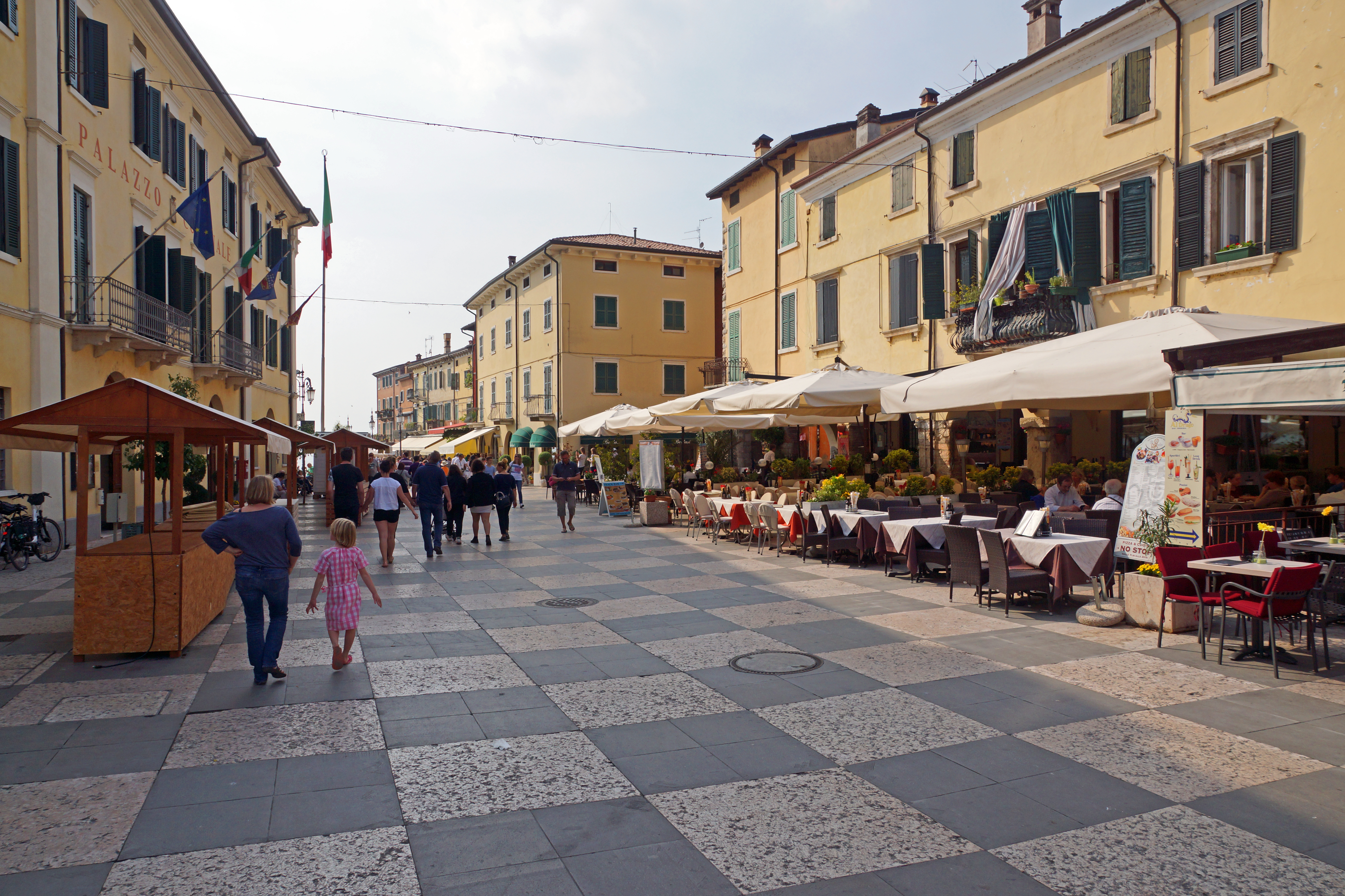 2017-04-10 04-14 Gardasee 252 Lazise